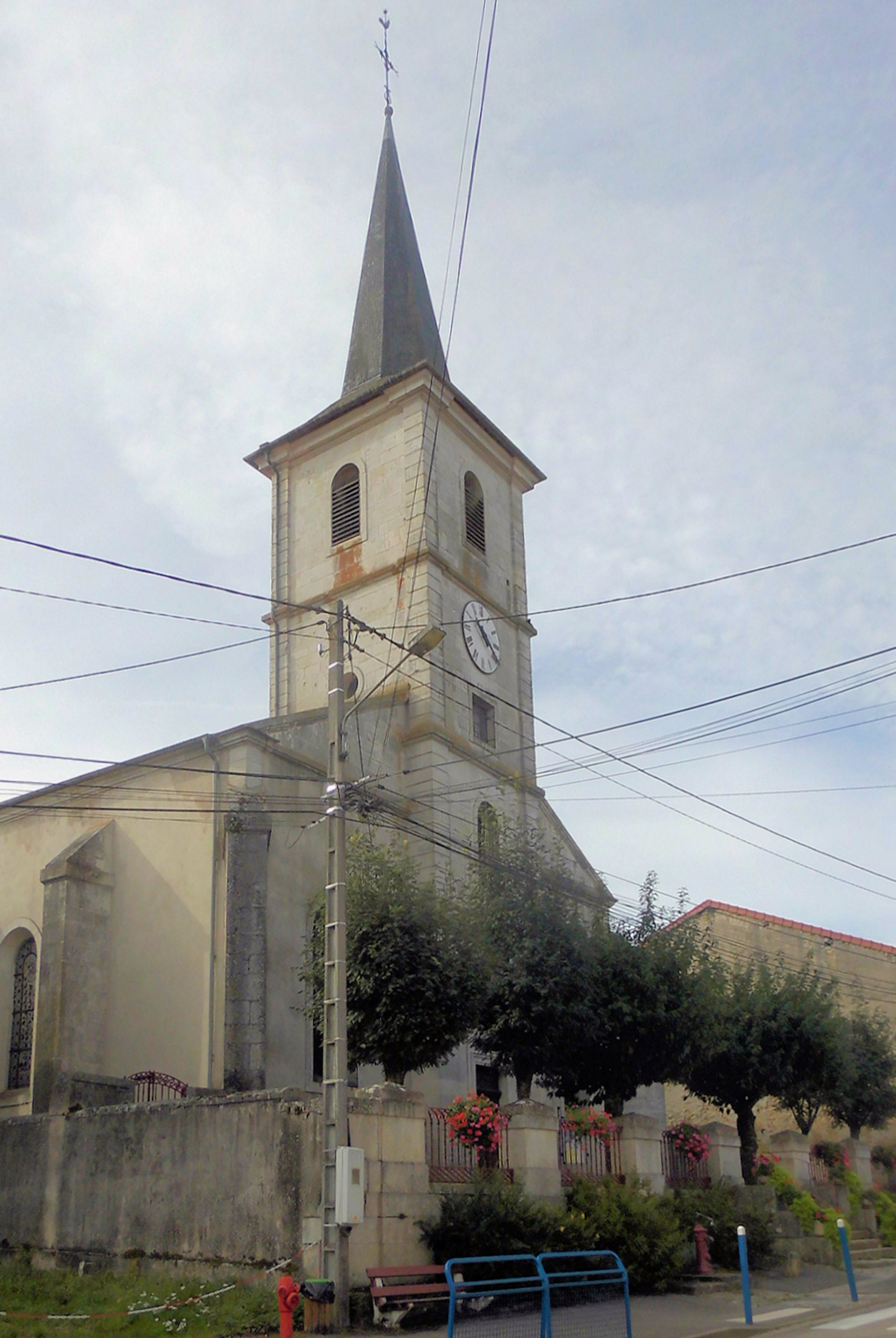 L'édlise Saints-Abdon-et-Sennen à Favières